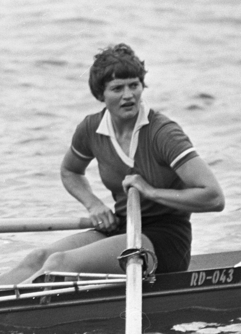 Europese roeikampioenschappen dames in Duisburg, Russisch dubbel twee: Daina Schweiz